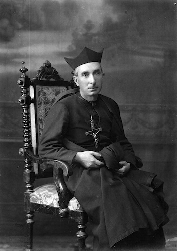 Tiburcio Arnáiz.